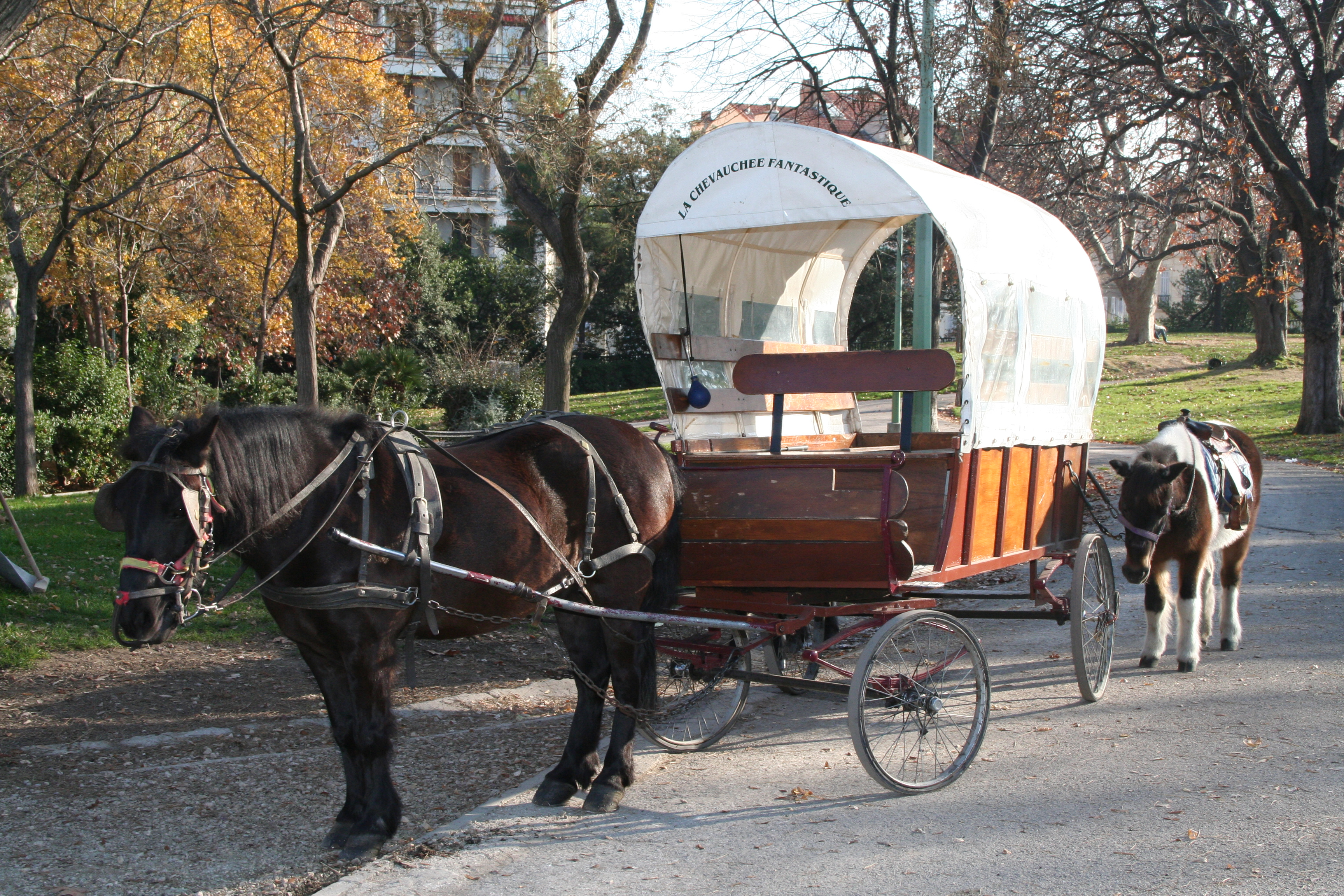 Palais Longchamp, Marseille (France).